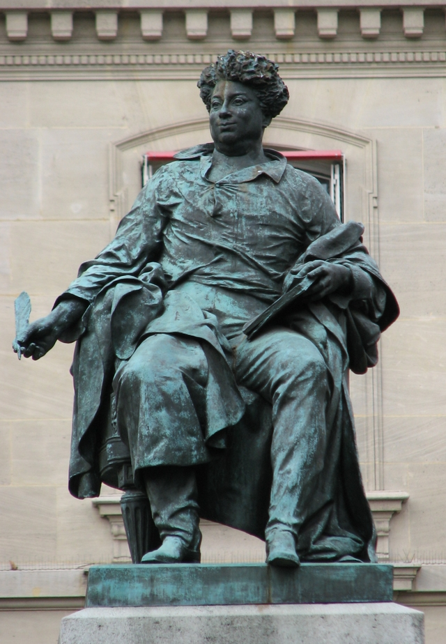 Памятник Александру Дюма в 17-м округе Парижа, пл. генерала Катру (Catroux)